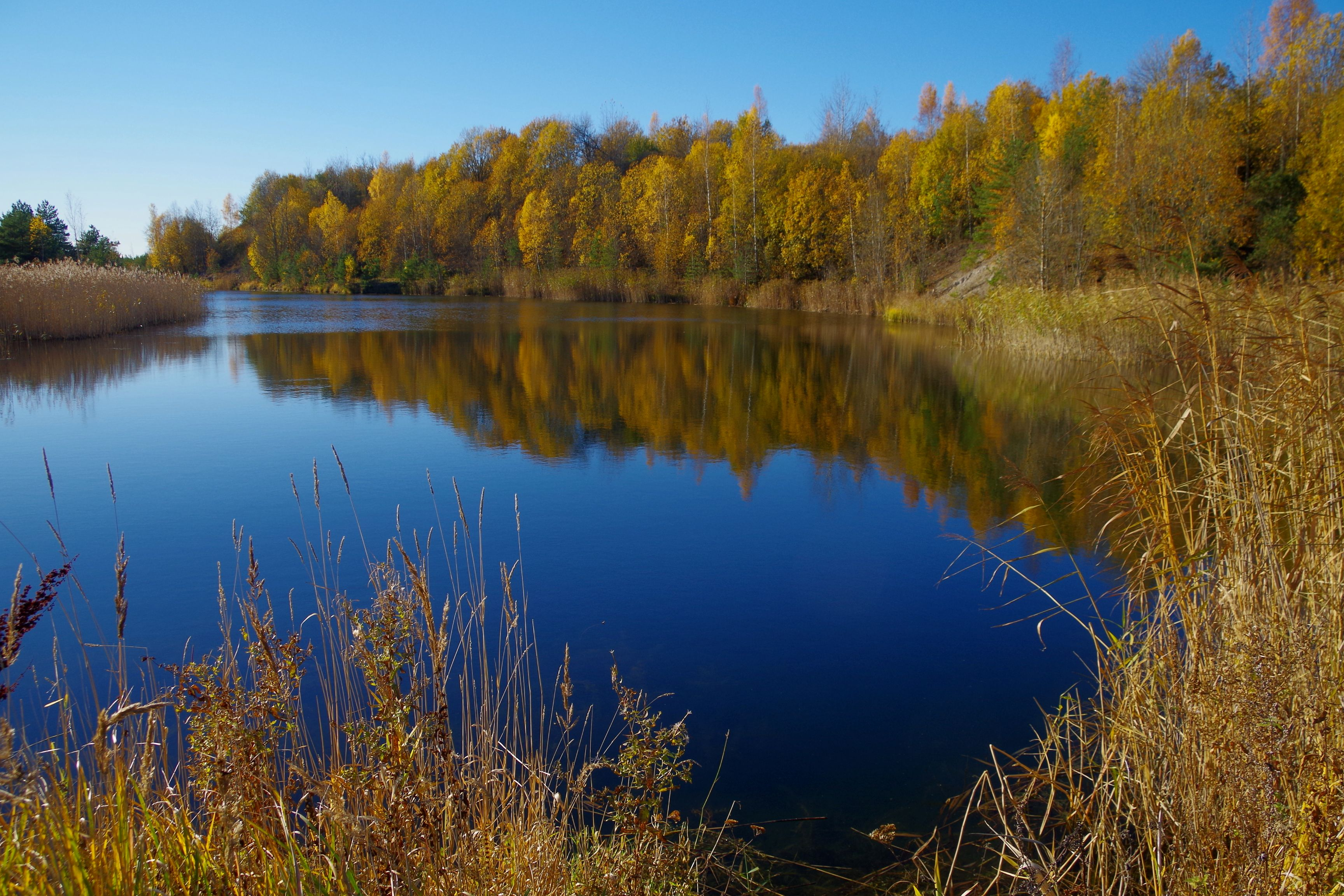 Pumbajärv on tehisjärv Harjumaal, Tallinna linna Nõmme linnaosas.